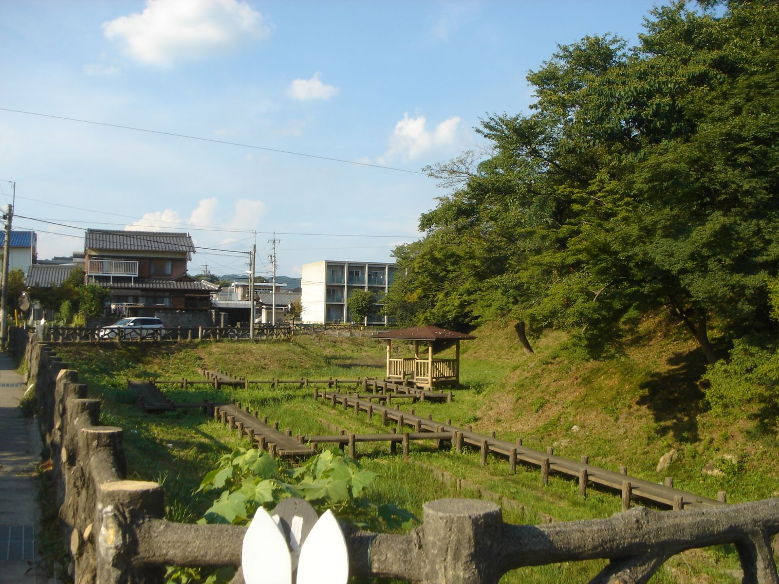 黒野城址の西側の堀、岐阜県岐阜市で撮影。